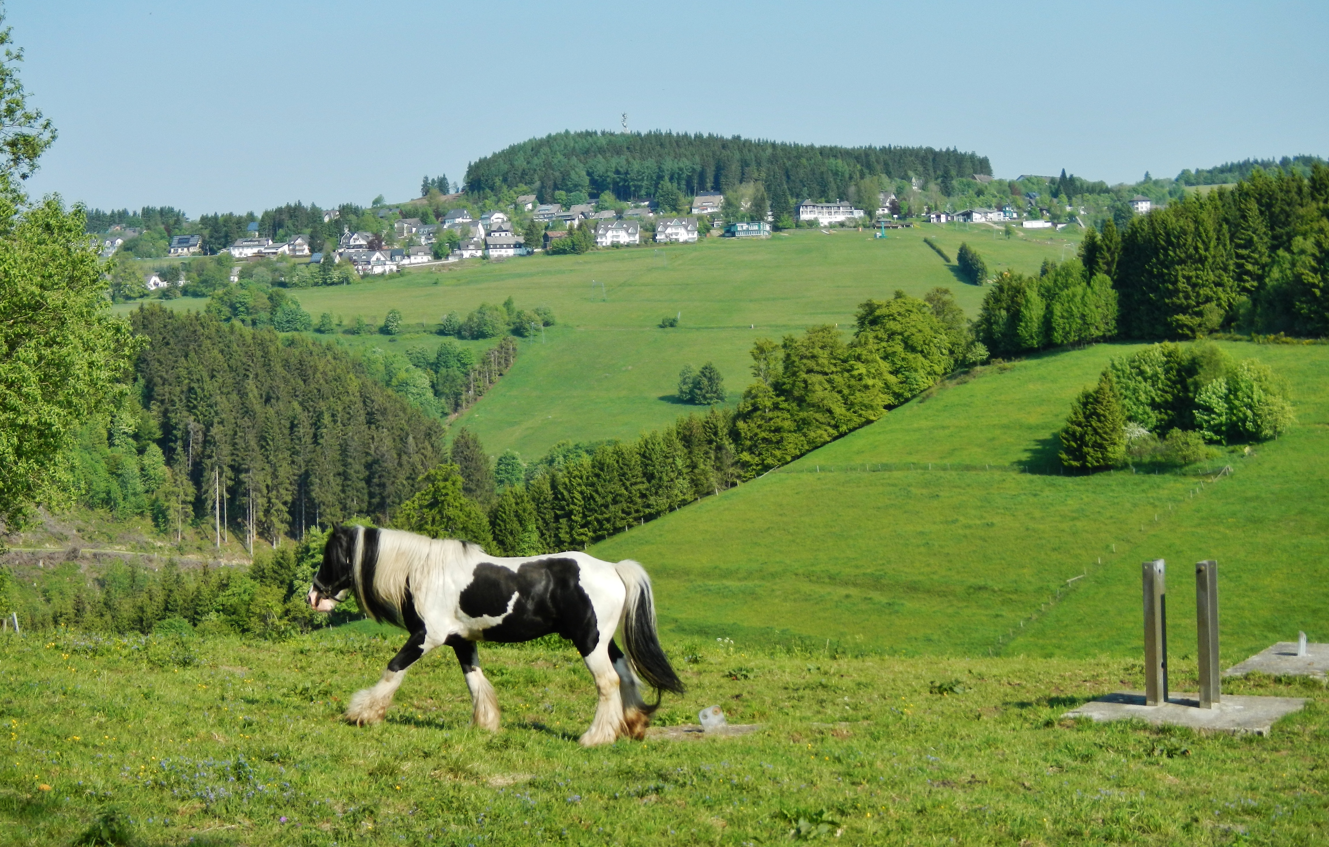 Blick von Mollseif zum Naturschutzgebiet Bergwiesen bei Neuastenberg mit Neuastenberg; Mit Wald vom LSG Winterberg im Hintergrund.